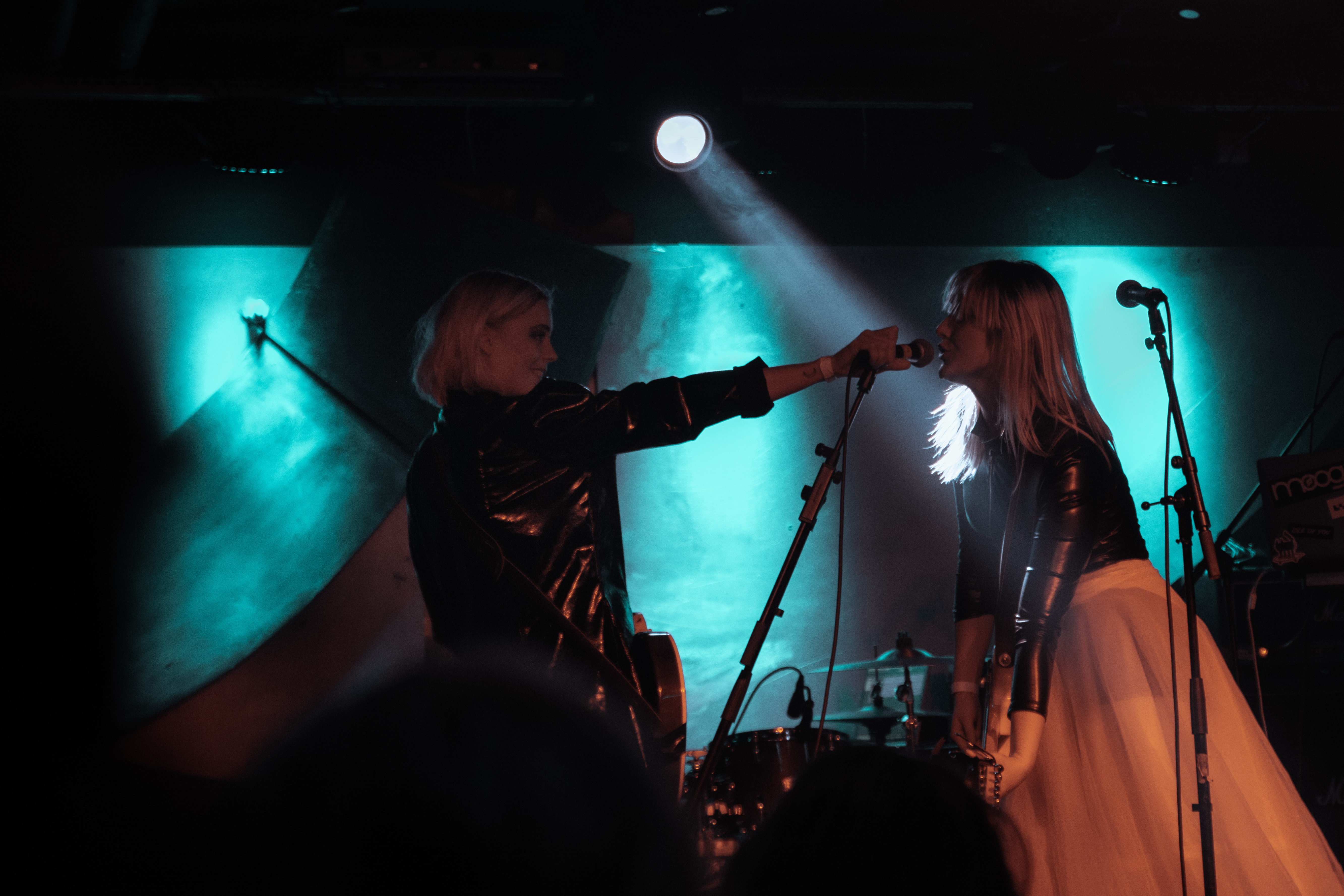 Foto: John Åkerblom